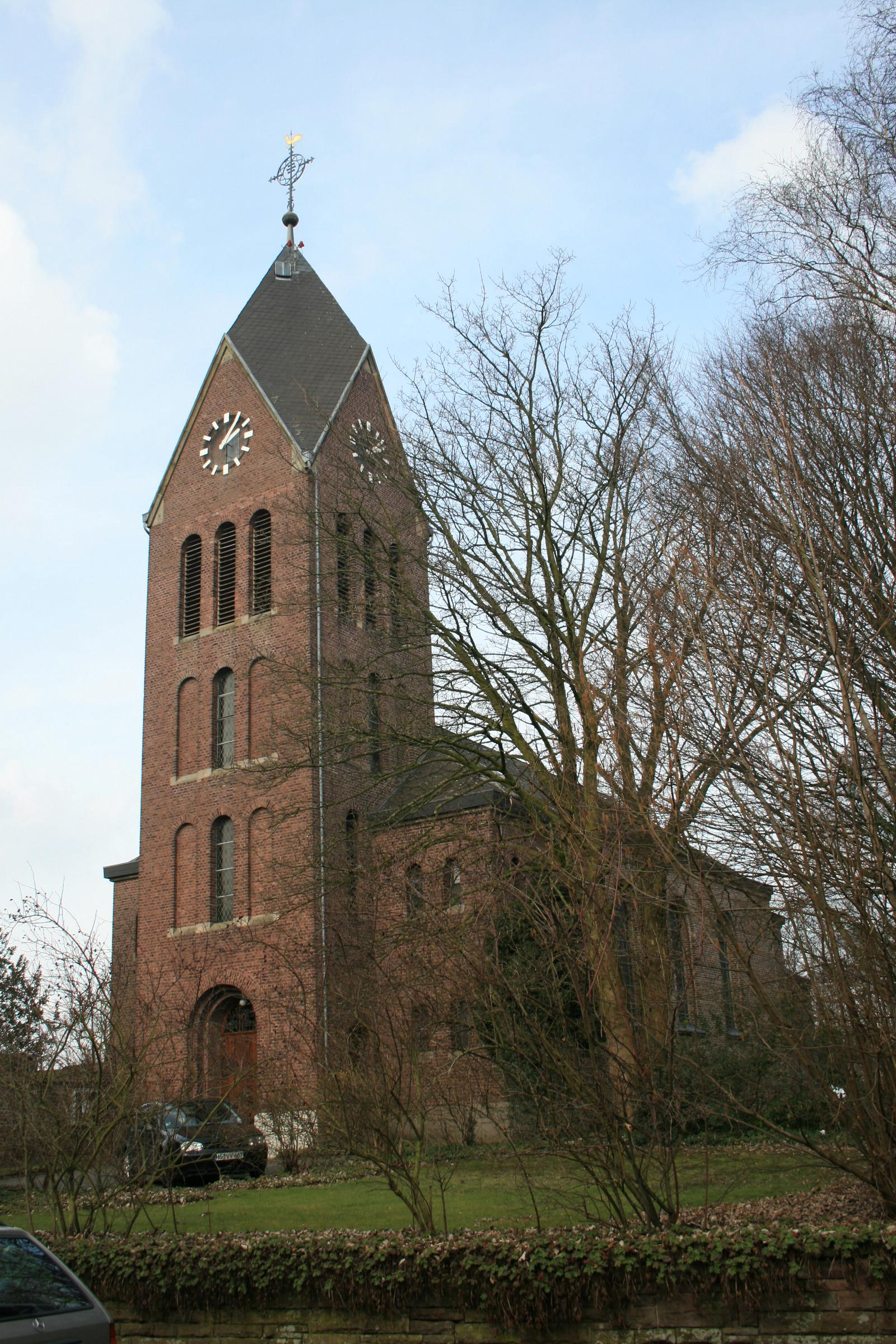 Kath. Pfarrkirche St. Cornelius, Geilenkirchen-Grotenrath